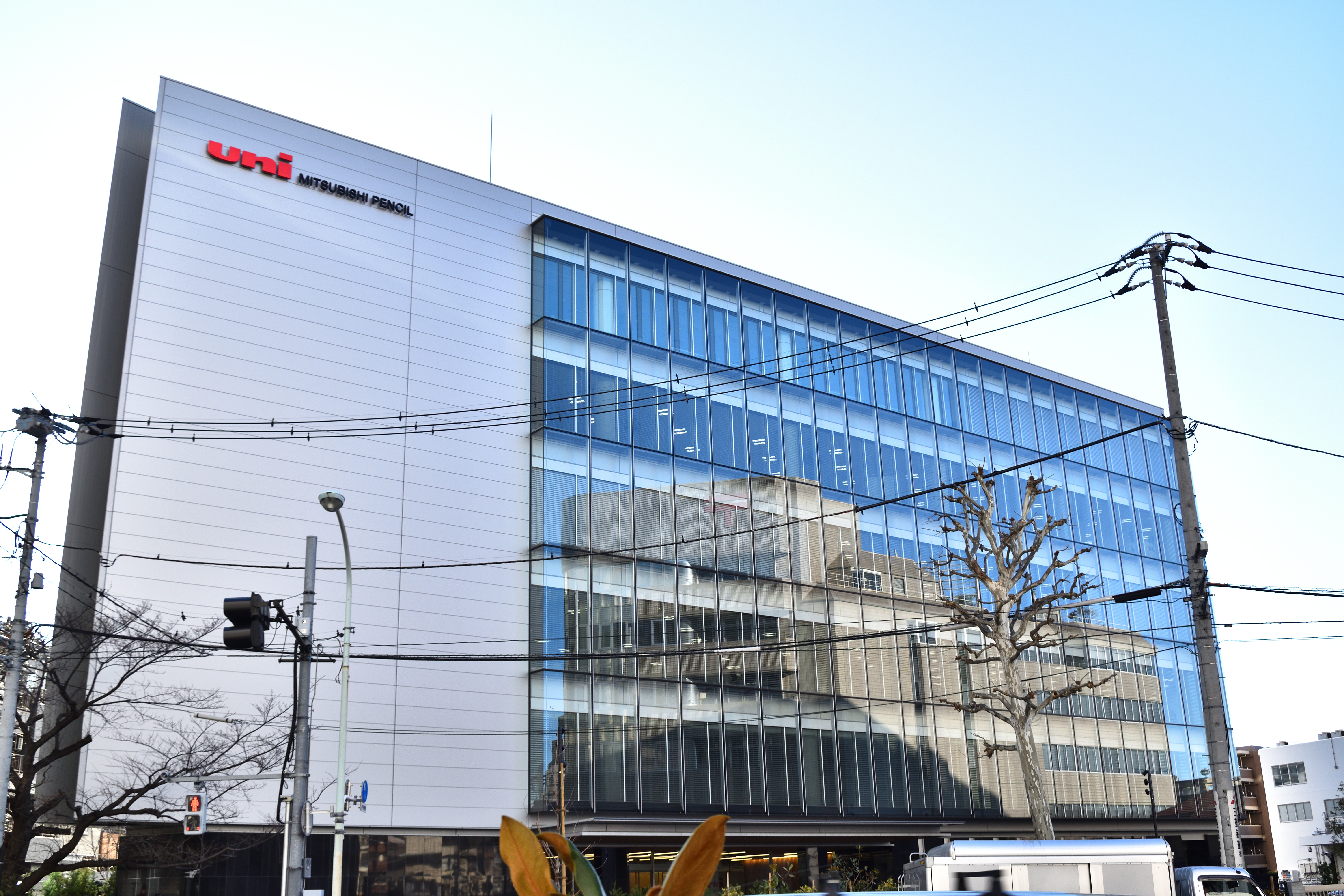 三菱鉛筆株式会社 本社ビル。東京都品川区東大井五丁目23番37号。2018年7月竣工。